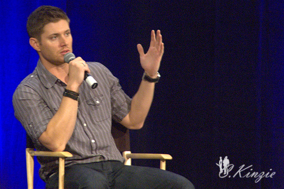 jensen007